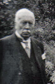 Emile Coart